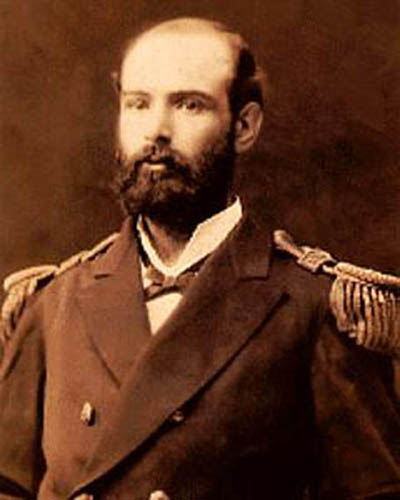 Agustín Arturo Prat Chacón (Hacienda San Agustín de Puñual, Ninhue, Chile, 3 de abril de 1848 - Iquique, Chile 21 de mayo de 1879) marino, militar y abogado chileno. Es considerado en Chile como su máximo héroe naval. Participó en los años 1860 en la guerra contra España en varios enfrentamientos navales importantes, incluyendo batallas en Papudo (en 1865)en el que participó en la captura de la Goleta Covadonga y en Abtao (1866). Durante la guerra del Pacífico comandó la Esmeralda en el combate naval de Iquique.